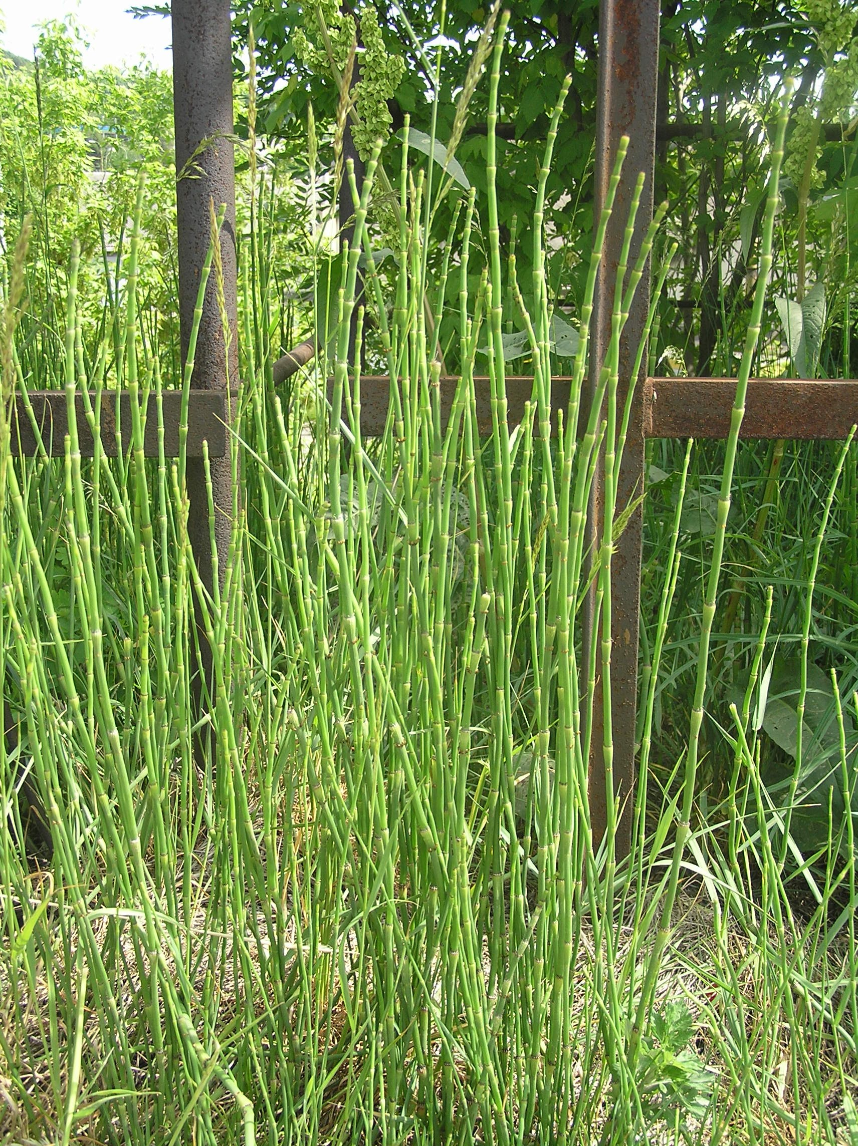 Equisetum × moorei, Brno - Židenice, Czech Republic